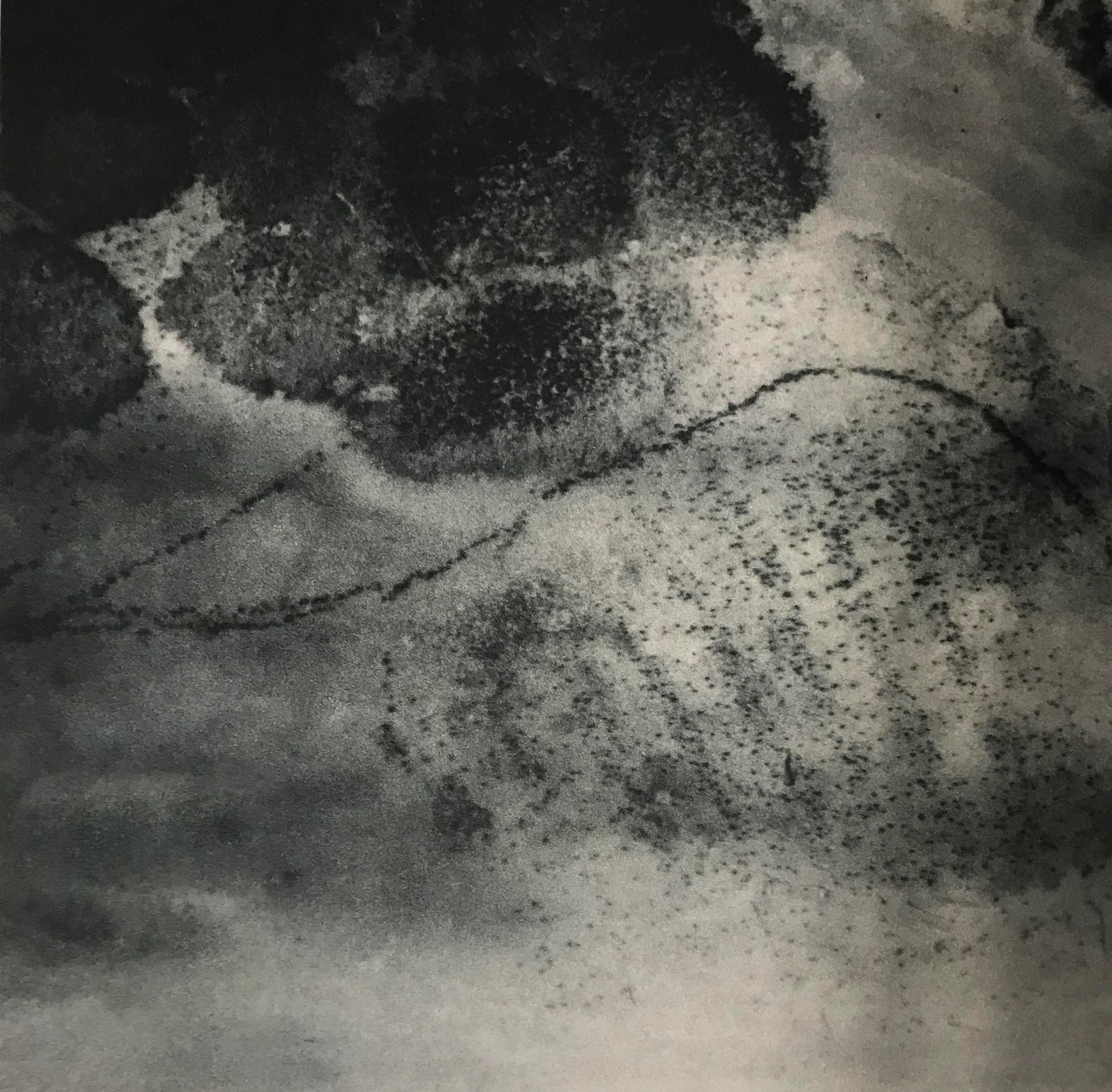 Photographie aérienne du site de Cortaillod-Est réalisée en 1927 sous la direction de Paul Vouga. Tiré de KAESER M.-A. & NORDIGUIAN L. 2016 : De l’Asie Mineure au ciel du Levant : Antoine Poidebard, explorateur et pionnier de l’archéologie aérienne. Laténium, Hauterive. p. 147